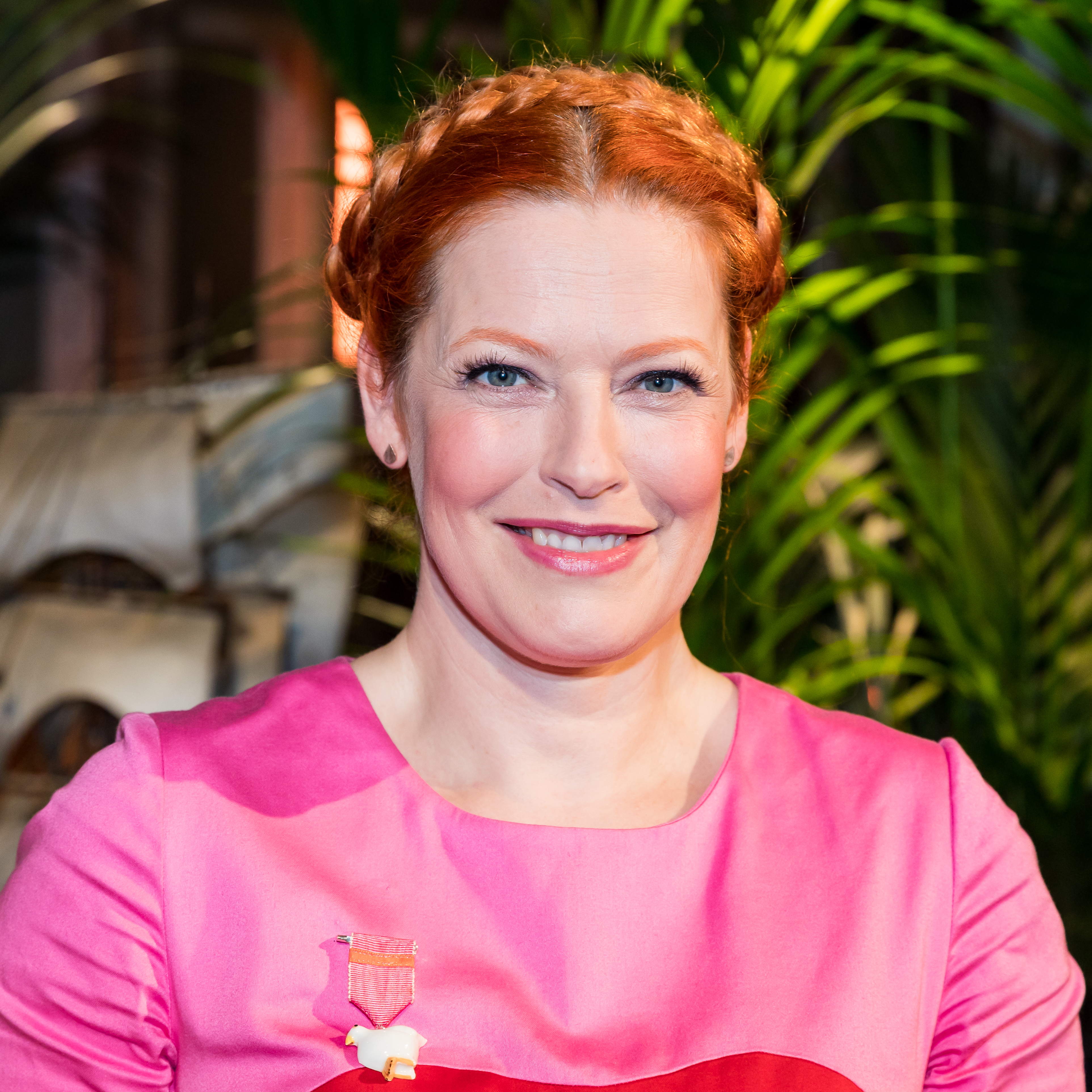 „Geheimniskrämer“ mit Martin Klempnow und seinen Gästen. Aufzeichnung des Westdeutschen Rundfunks im Studio Köln-Bocklemünd vom 26. Januar 2018 Foto: Enie van de Meiklokjes